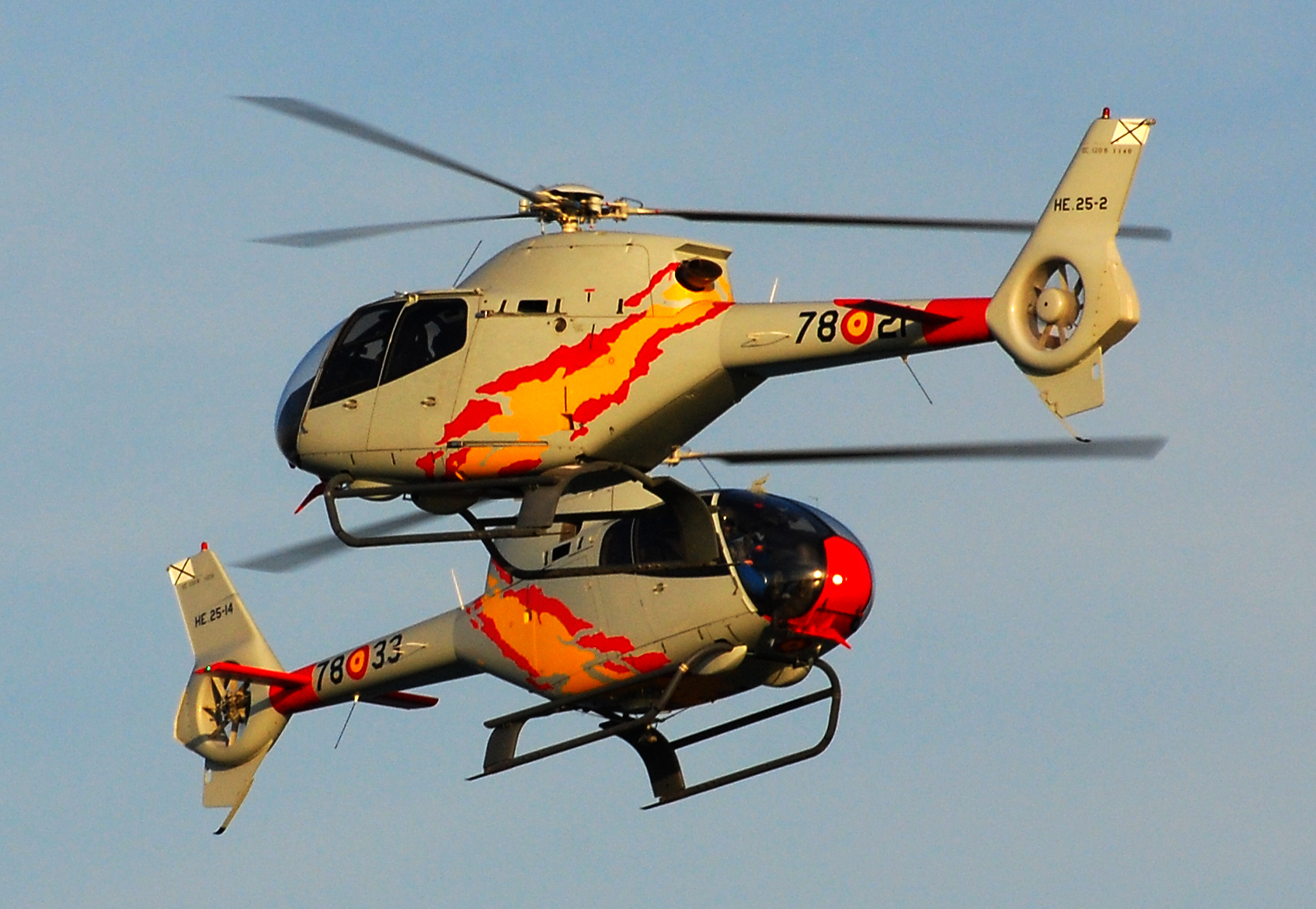 Festa al Cel - Barcelona, 04-octubre-2009